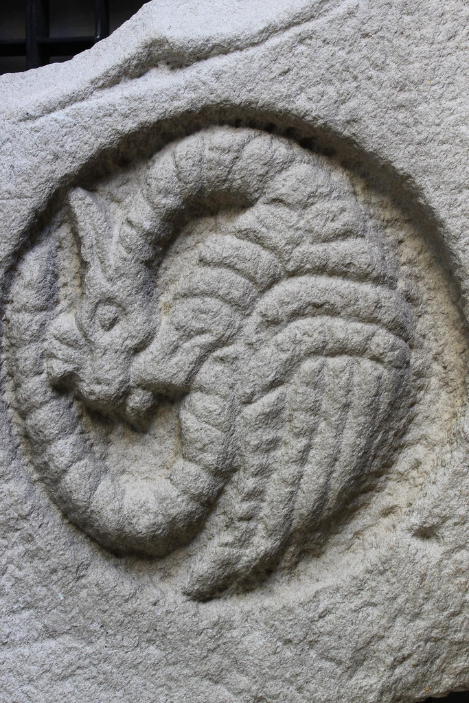 Relevo en granito. Museo de San Antón (A Coruña). Século XIV. Granite Relief. San Anton Museum (A Coruña). 14th century.